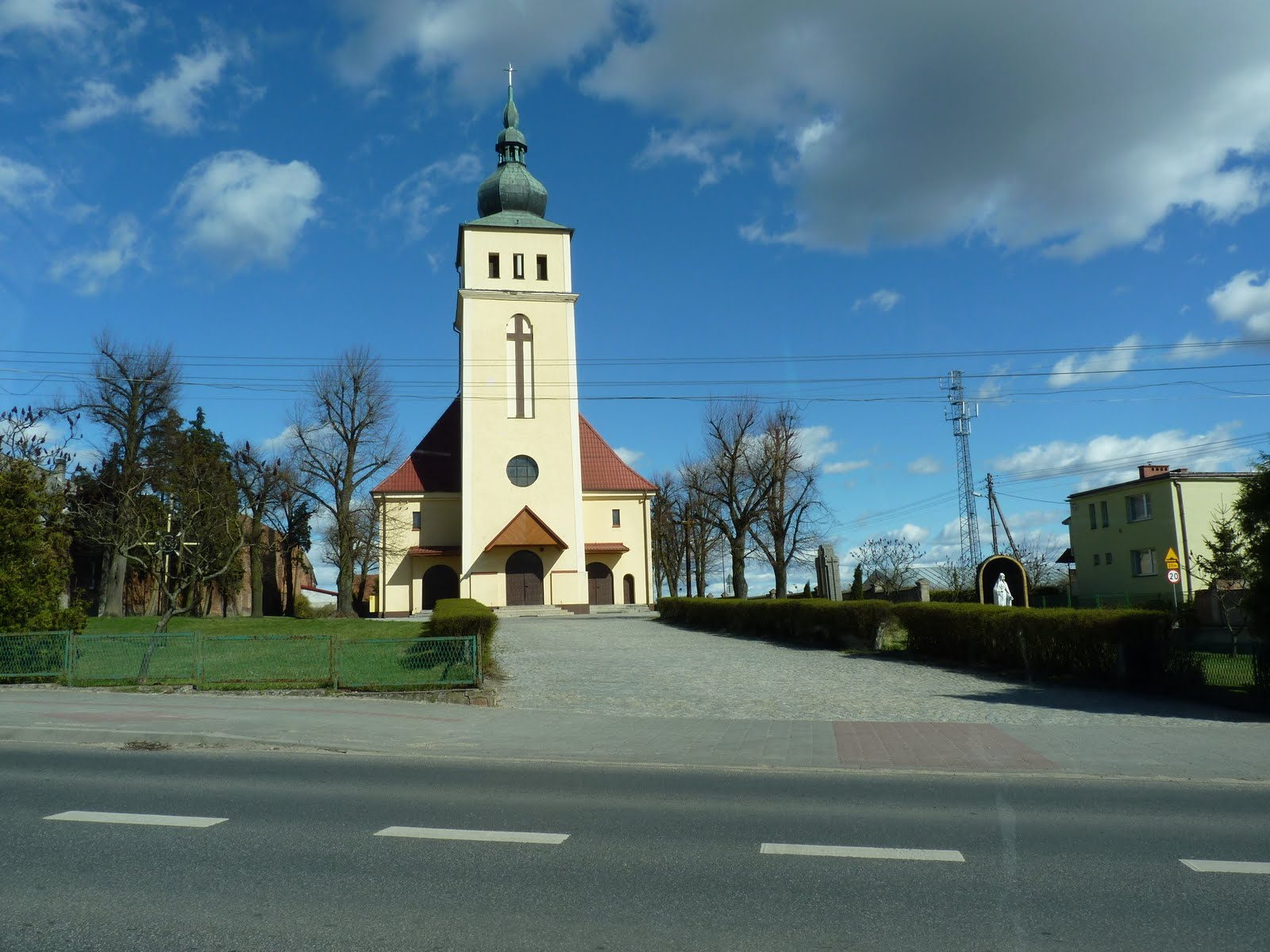 Kościół Katolicki w Białośliwiu